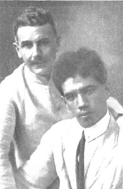 Fotografía que muestra al poeta español Salvador Rueda junto al poeta filipino Manuel Bernabé (sentado) durante una visita del primero a las Islas Filipinas en 1915.